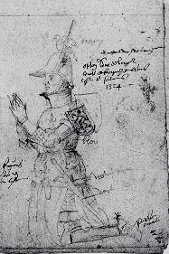 Effigies de Othon IV de Bourgogne: portail de la Thieuloye